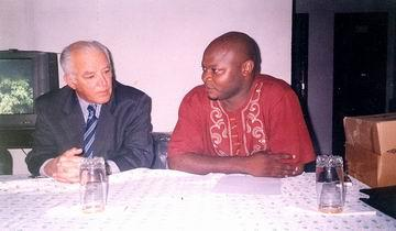 Professor Mesquitela Lima em Angola